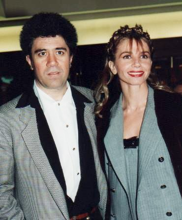 Pedro Almodovar et Victoria Abril à la cérémonie des Césars.